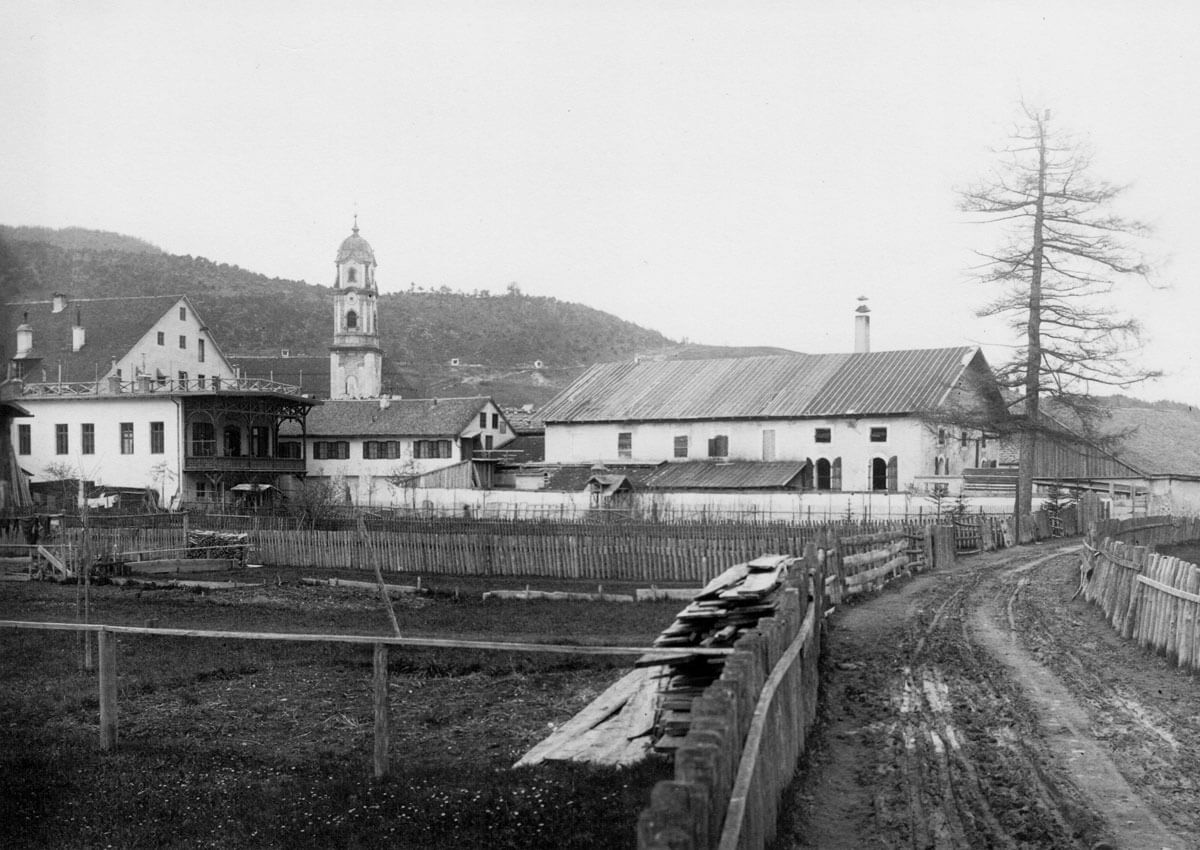 Erstes Brauereigebäude in Mittenwald.